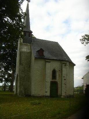 Petronellakapelle auf Gut Dirlau, Gemeinde Vettweiß, Kreis Düren